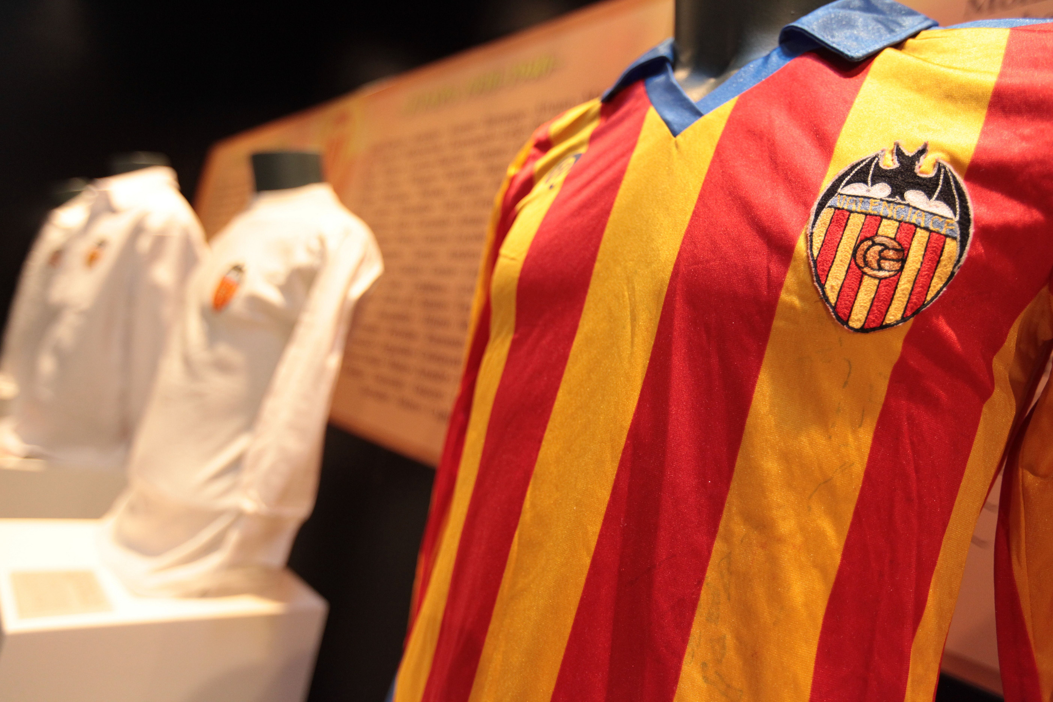 Ciudad de las Artes y las Ciencias. Valencia Exposición 'Ciencia y deporte con el Valencia CF'.